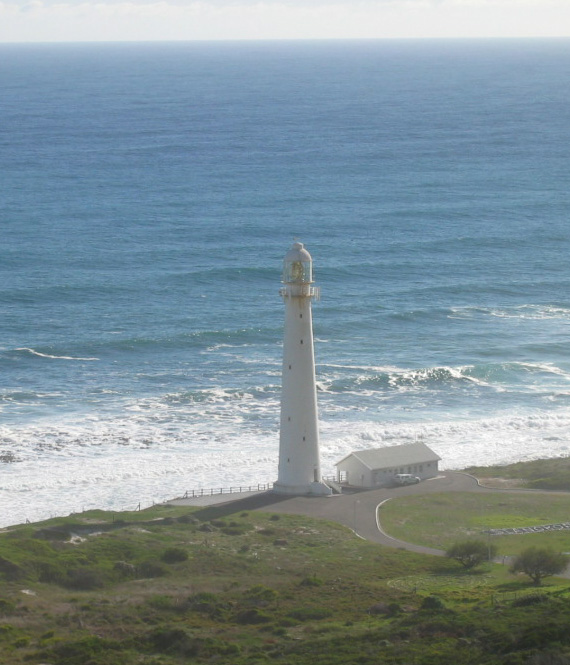 Phare sud-africain, situé à l'est du Cap de Bonne Espérance 2004 V. Rocard